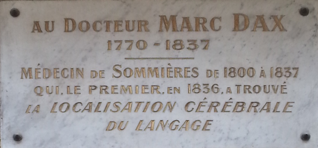 Au docteur Marc Dax (1770-1837), médecin de Sommières de 1800 à 1837 qui le premier, en 1836, a trouvé la localisation cérébrale du langage.